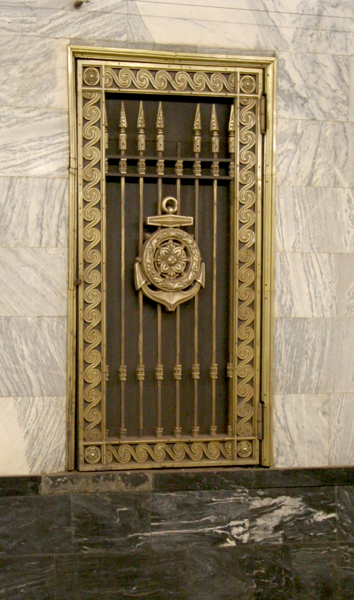 St.Petersburg Metro station Baltyskaja